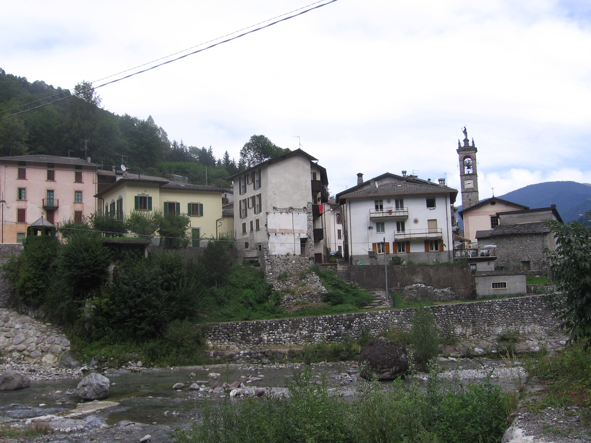 Cassiglio, Bergamo, Italy